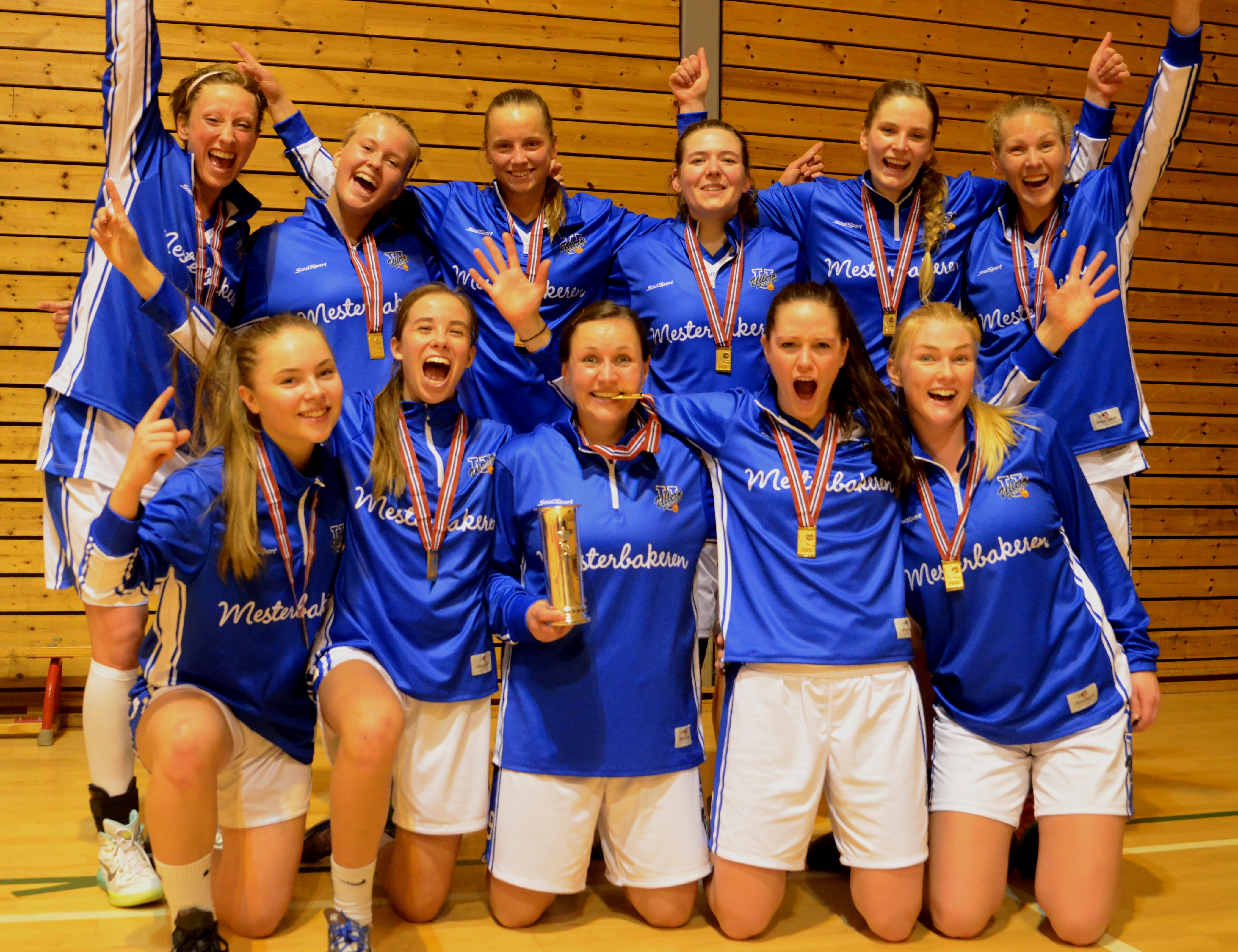 Norgesmestere 2016